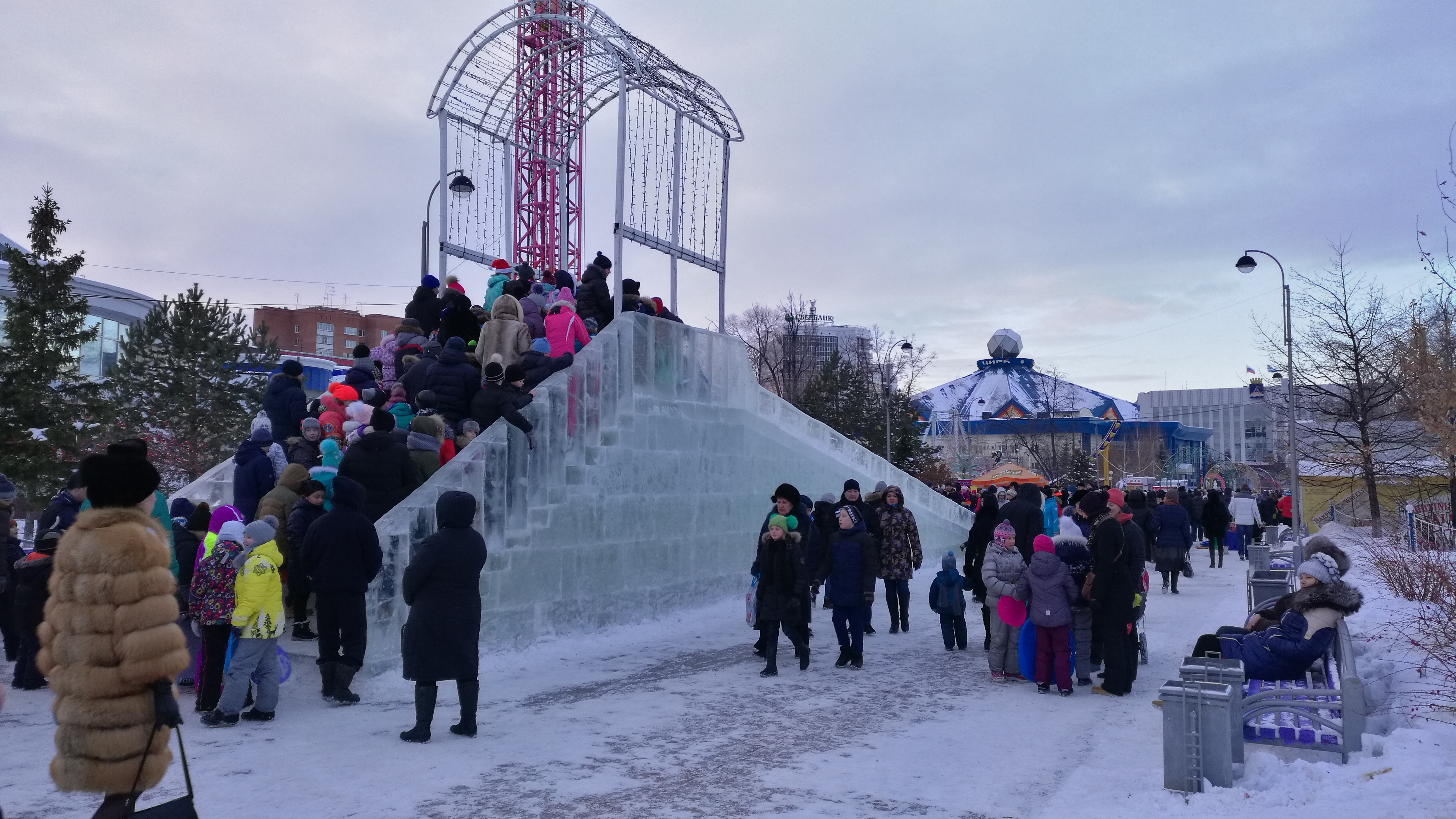 Deglitejo en Kolora bulvardo. Tjumeno, Rusio.